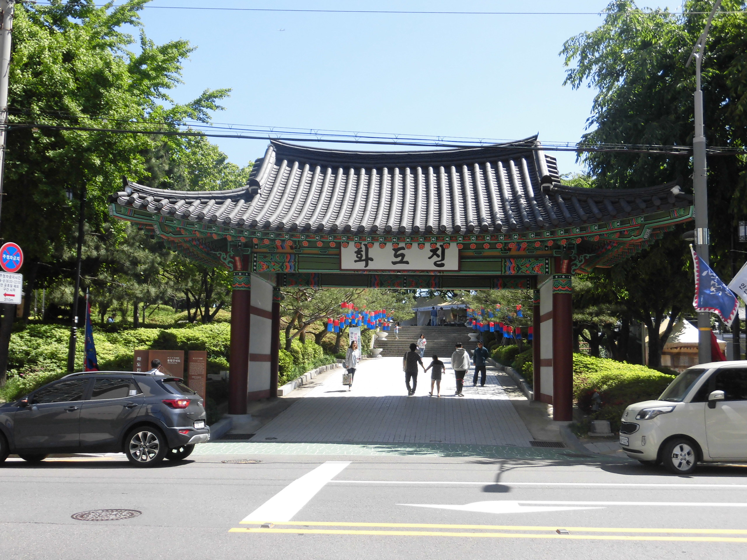 인천광역시 동구에 있는 화도진공원